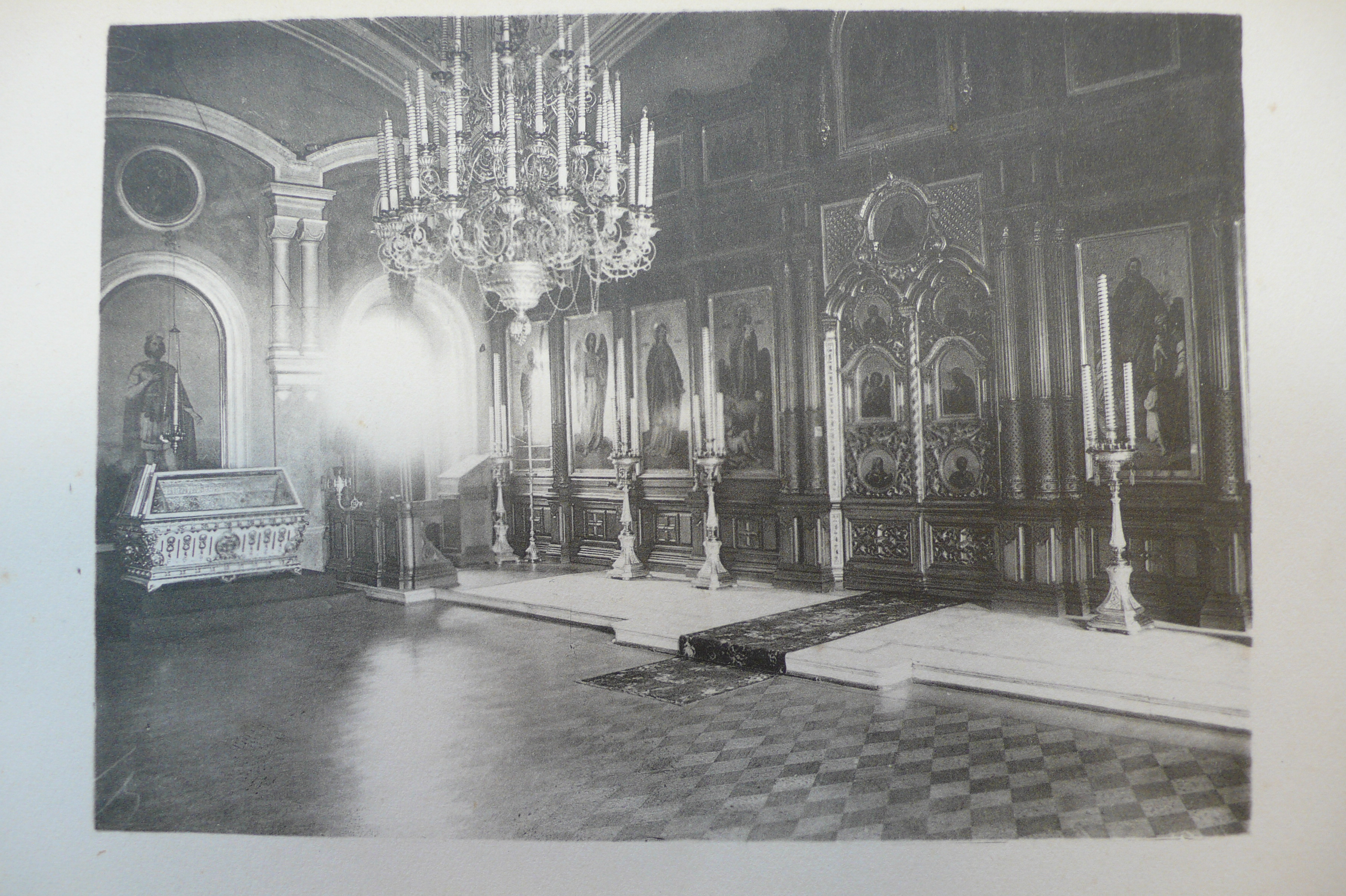 Храм Александра Невского при Комиссароском ремесленном училище 1880-е гг.